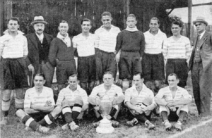 photo de l'équipe de football du Racing Club de Paris, vainqueur du doublé coupe-championnat de France en 1935-1936. Debout : Schmitt, Victor Mestre (Dir.), Roux, Banide, Diagne, Hiden, Jordan, Delfour. Accroupis : Mercier, Kennedy, Couard, Veinante, Mathé